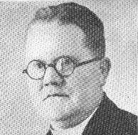 Vladimír Čermák (1901 - 1942), Český římskokatolický kněz.